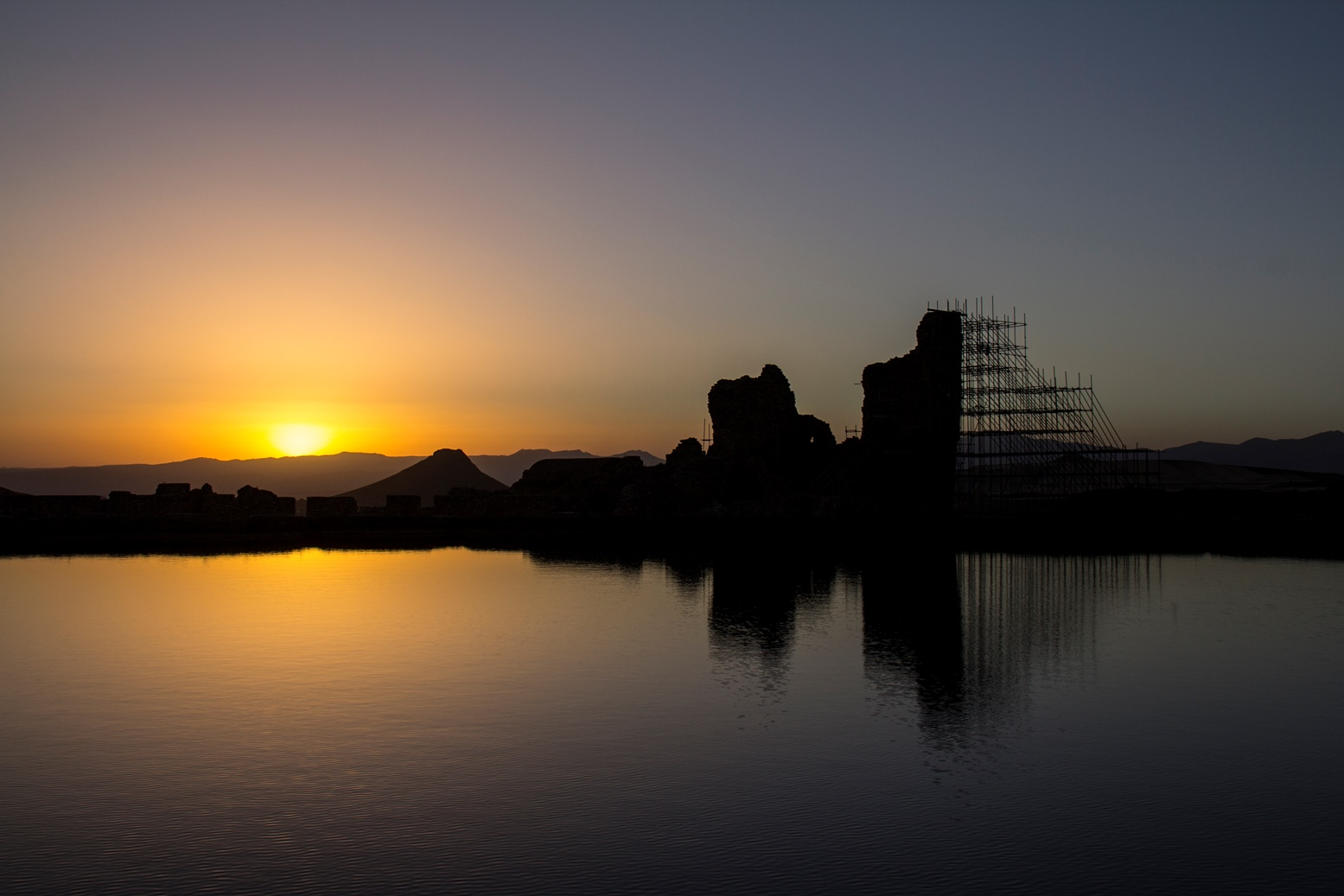 غروب تخت سلیمان خرابه‌های شهر و آتشکده